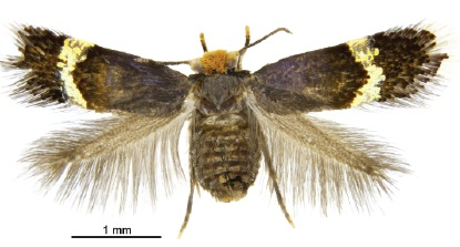 Pectinivalva minotaurus